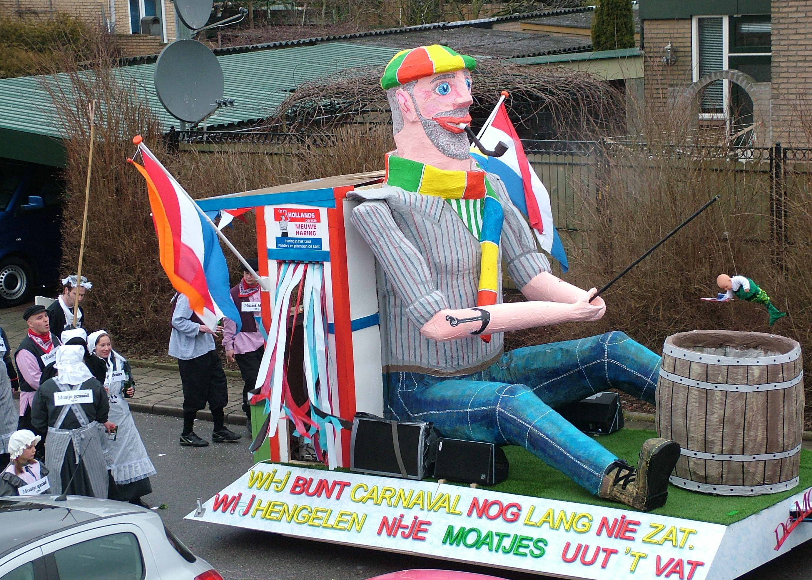 Karneval in Silvolde. Niedersächsische Aufschrift "Wi-j bunt Carnaval nog lang nie zat. Wi-j hengelen ni-je moatjes uut 't vat." Zu